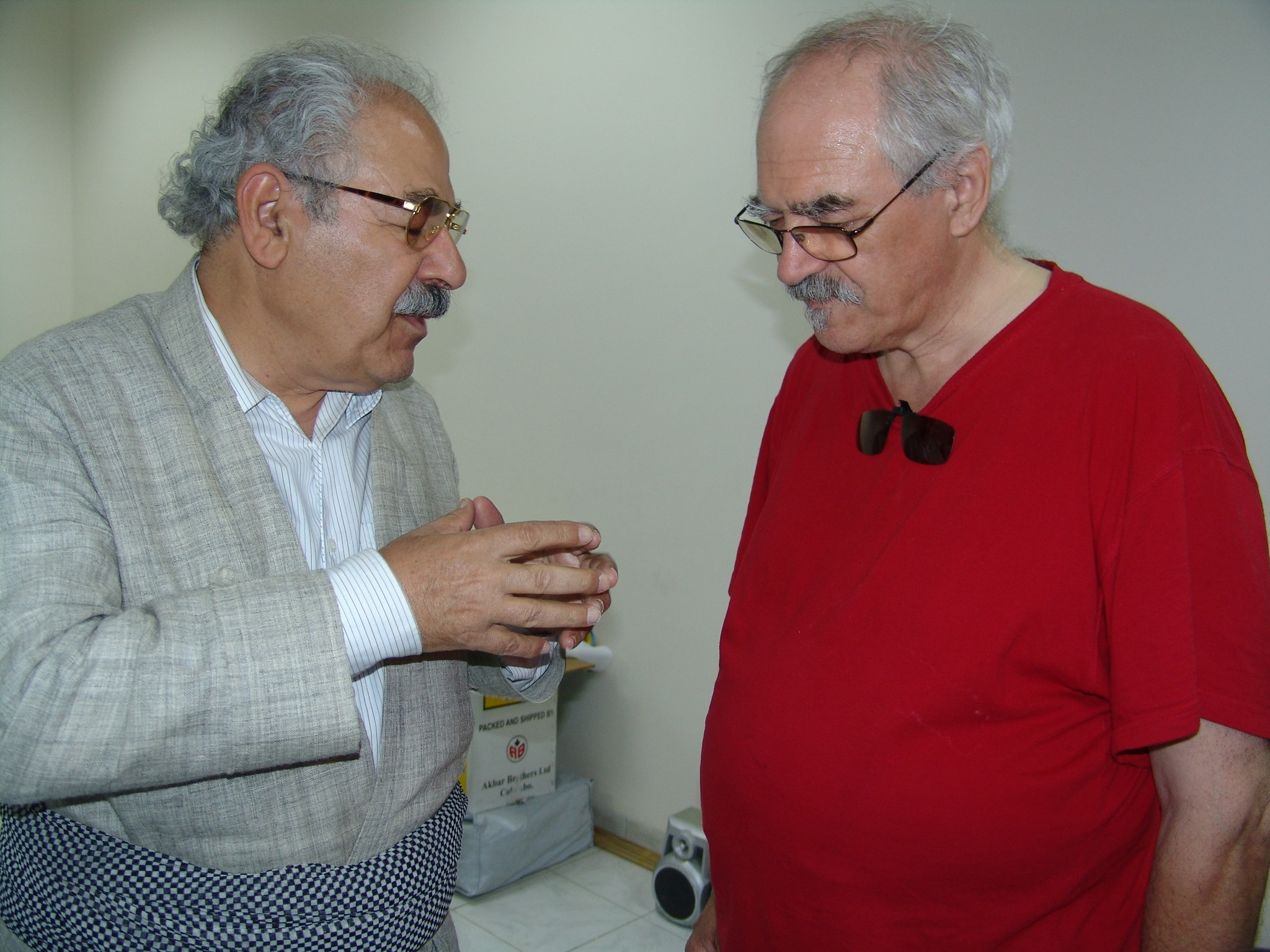 Bộ trương Văn hóa 2007 tại Iraq (trái) và Roby Bellemans (phải)